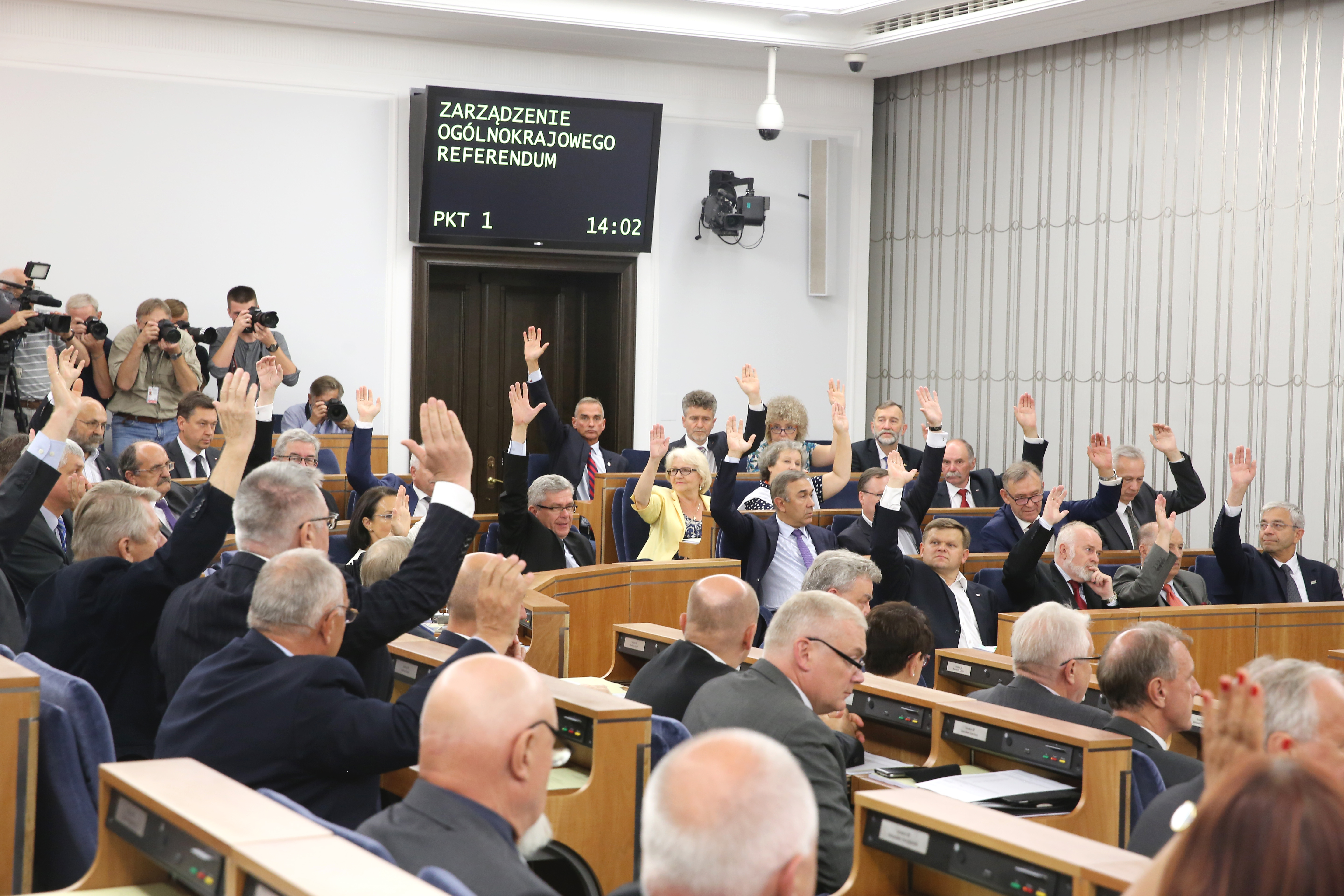 81. posiedzenie Senatu. Głosowanie nad wnioskiem Prezydenta Rzeczypospolitej Polskiej o zarządzeniu ogólnokrajowego referendum 25 października 2015 r.